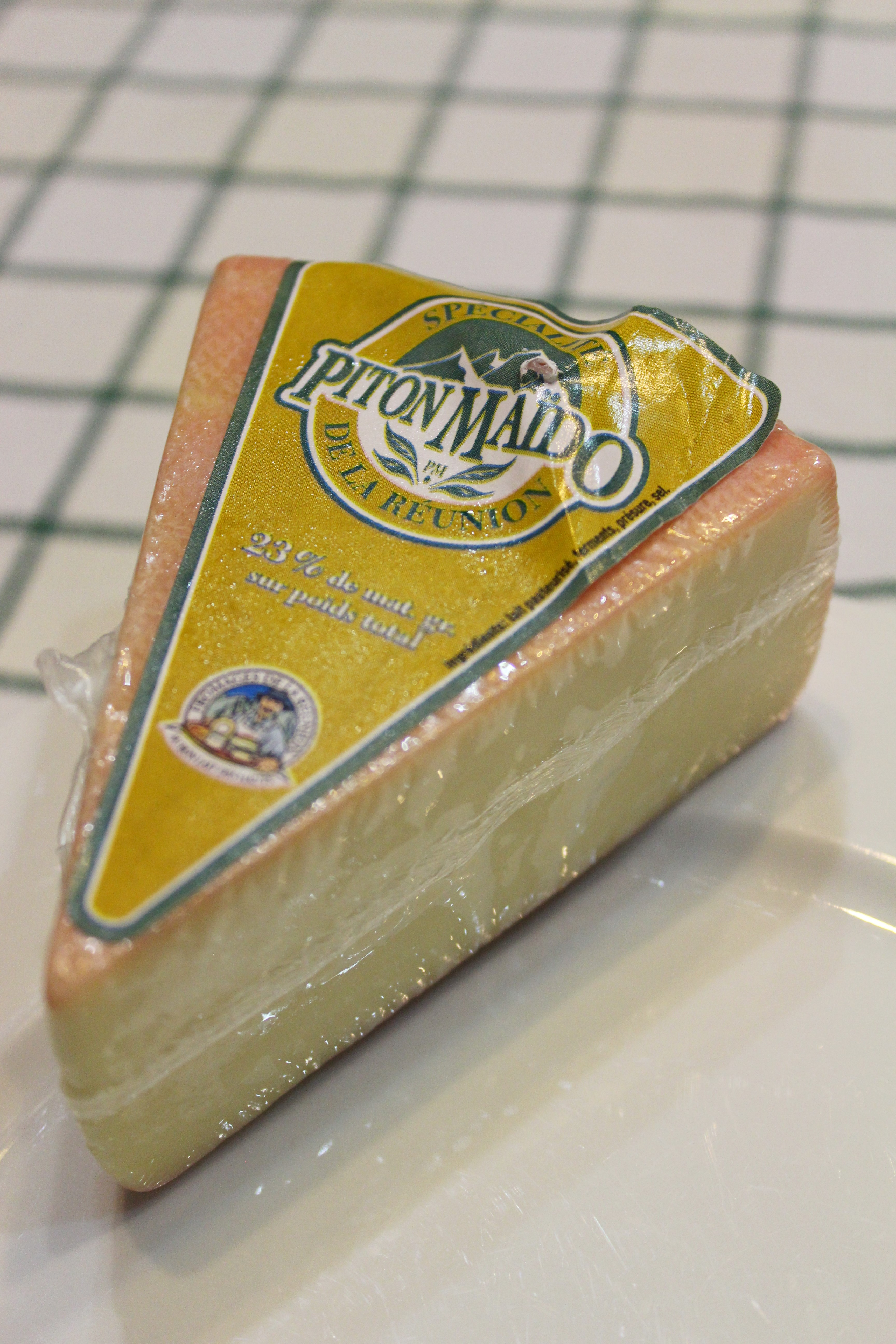 Part de sous emballage plastique.